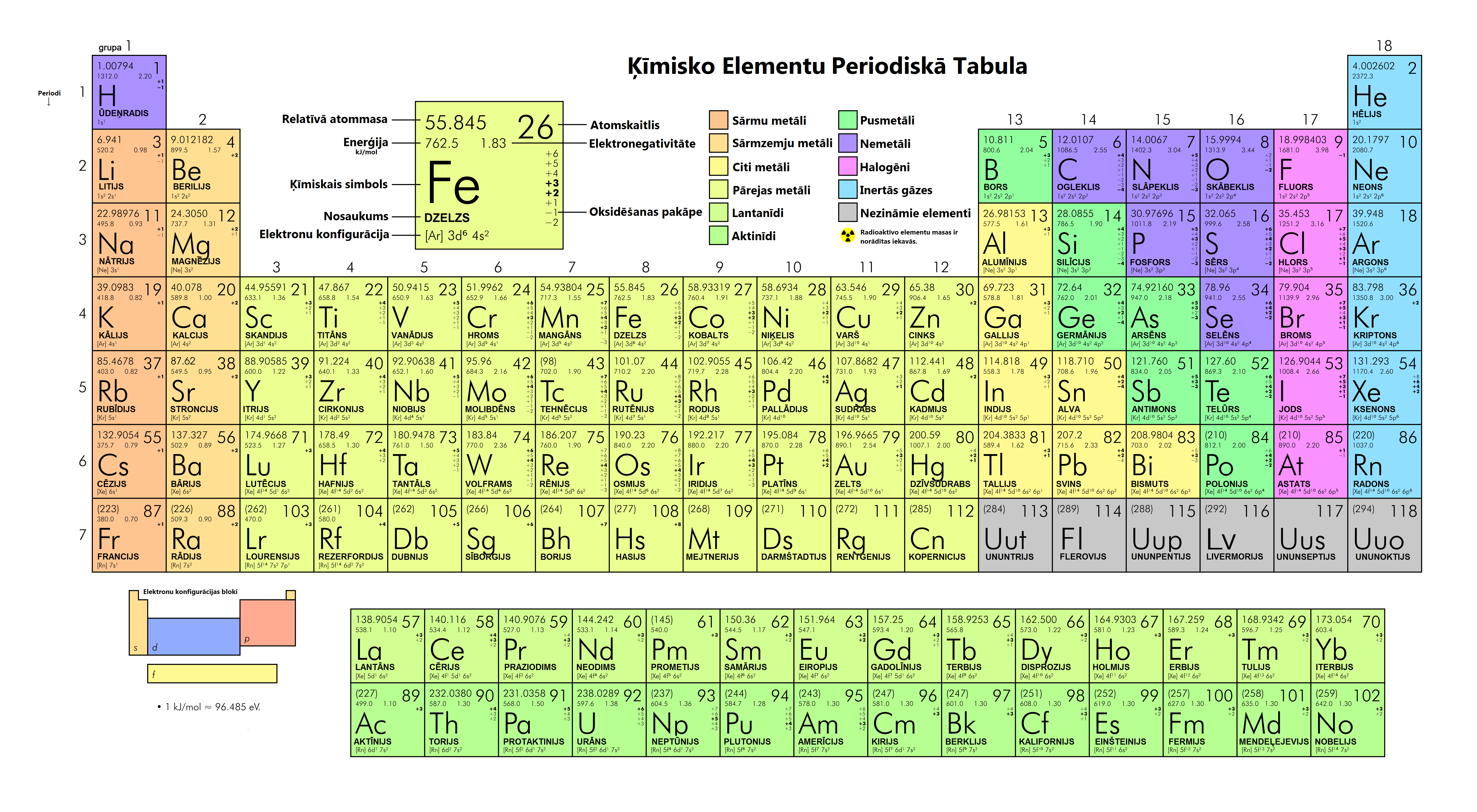 Ķīmisko Elementu Periodiskā Tabula